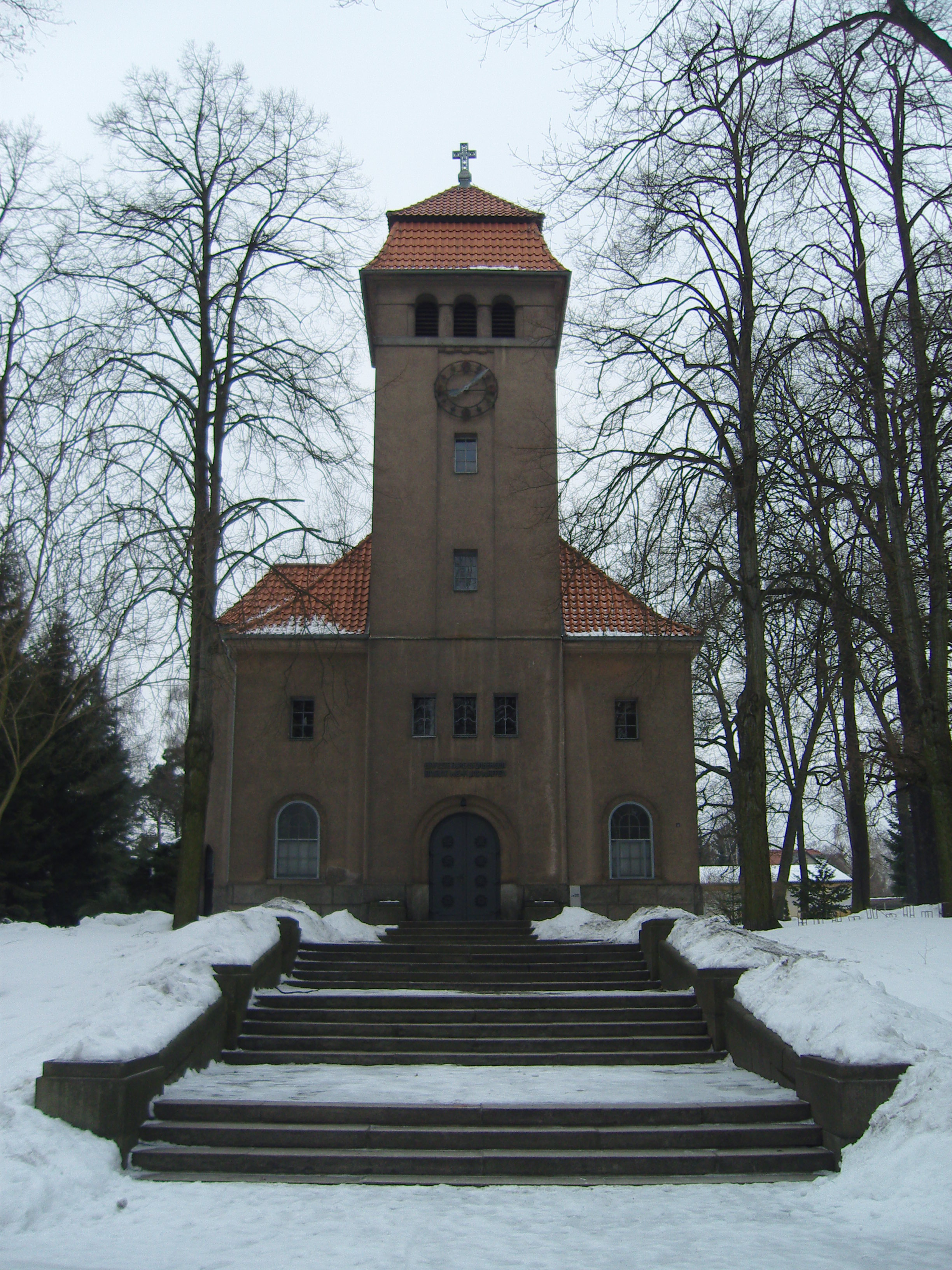 Friedensgedächtniskirche in Lauchhammer; Baudenkmal, 1996 profaniert